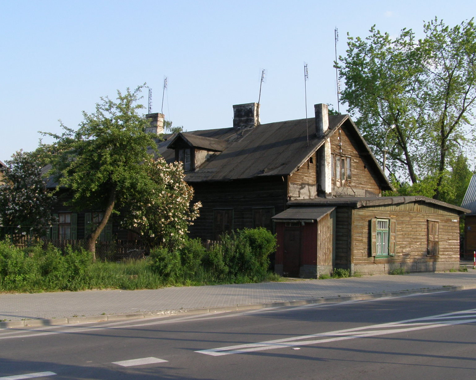 Dom drewniany w Mińsku. Zburzony w czerwcu 2008. Wooden house in Minsk. Demolished in June 2008. [1]